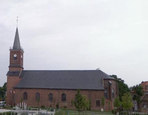 Foto van de kerk van Pont-à-Marcq